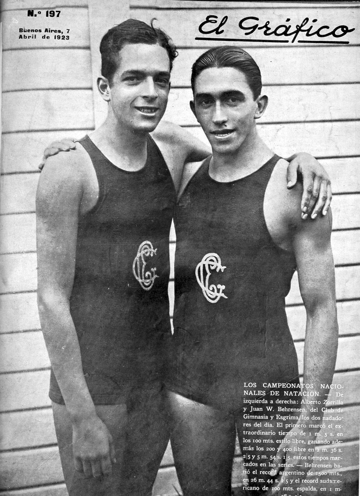 El Grafico del 07 de Abril de 1923. Edicion 197